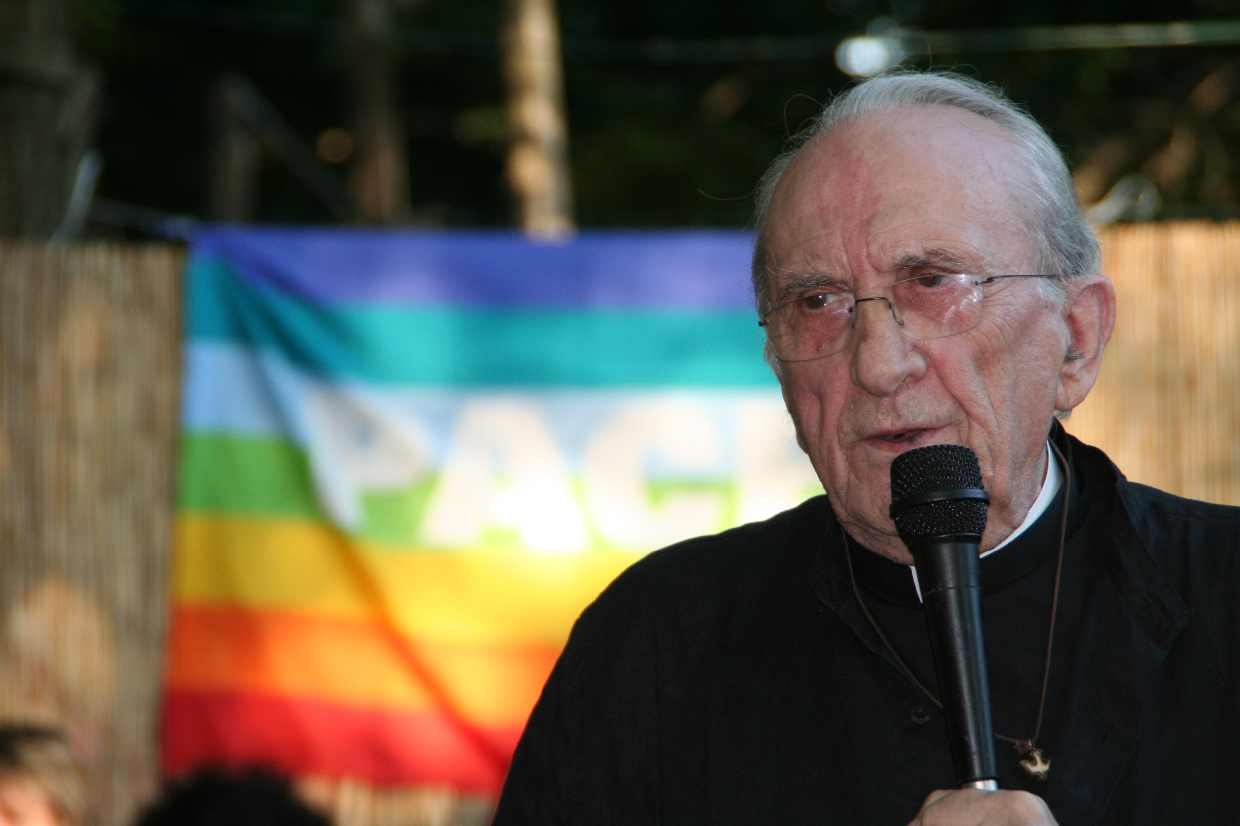 Don Andrea Gallo fotografato da William Domenichini